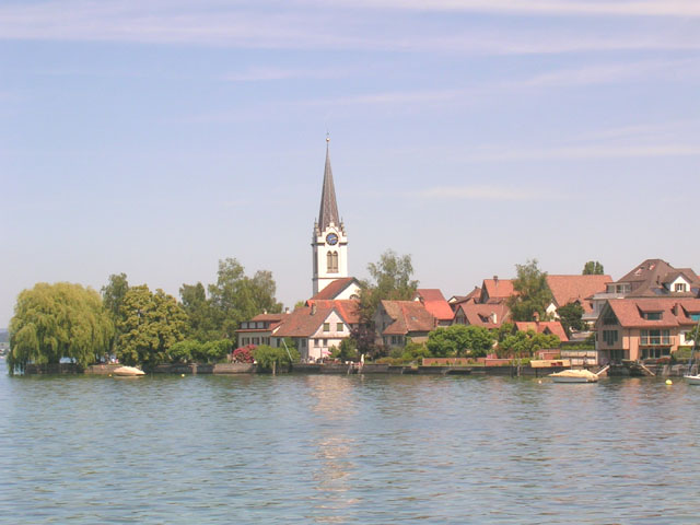 Berlingen - Ansicht von Westen